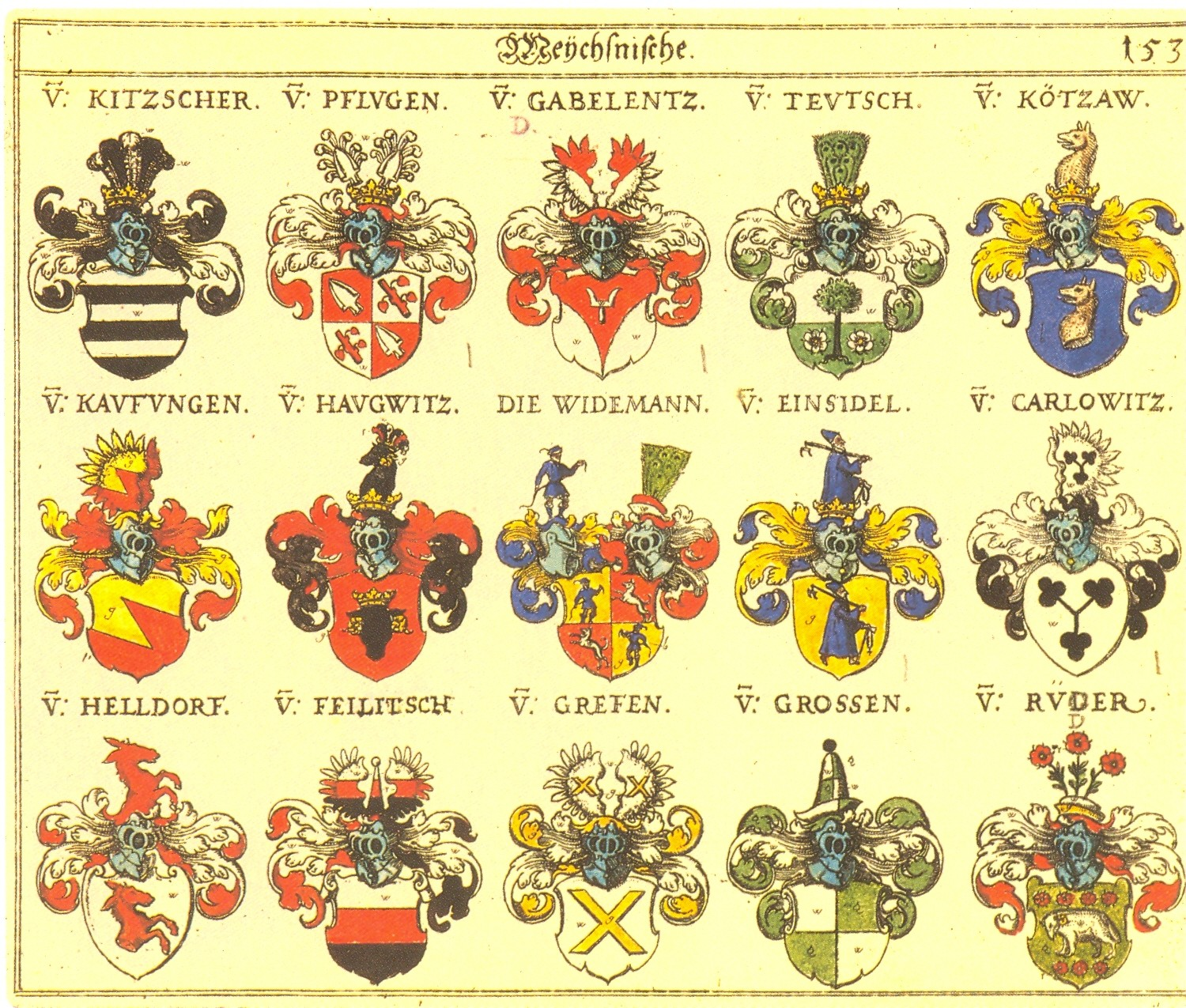 Johann Siebmacher: New Wappenbuch eingescannt aus: Horst Appuhn (Hrsg.), Johann Siebmachers Wappenbuch. Die bibliophilen Taschenbücher 538, 2. verb. Aufl , Dortmund 1989 Meißner Blatt 153